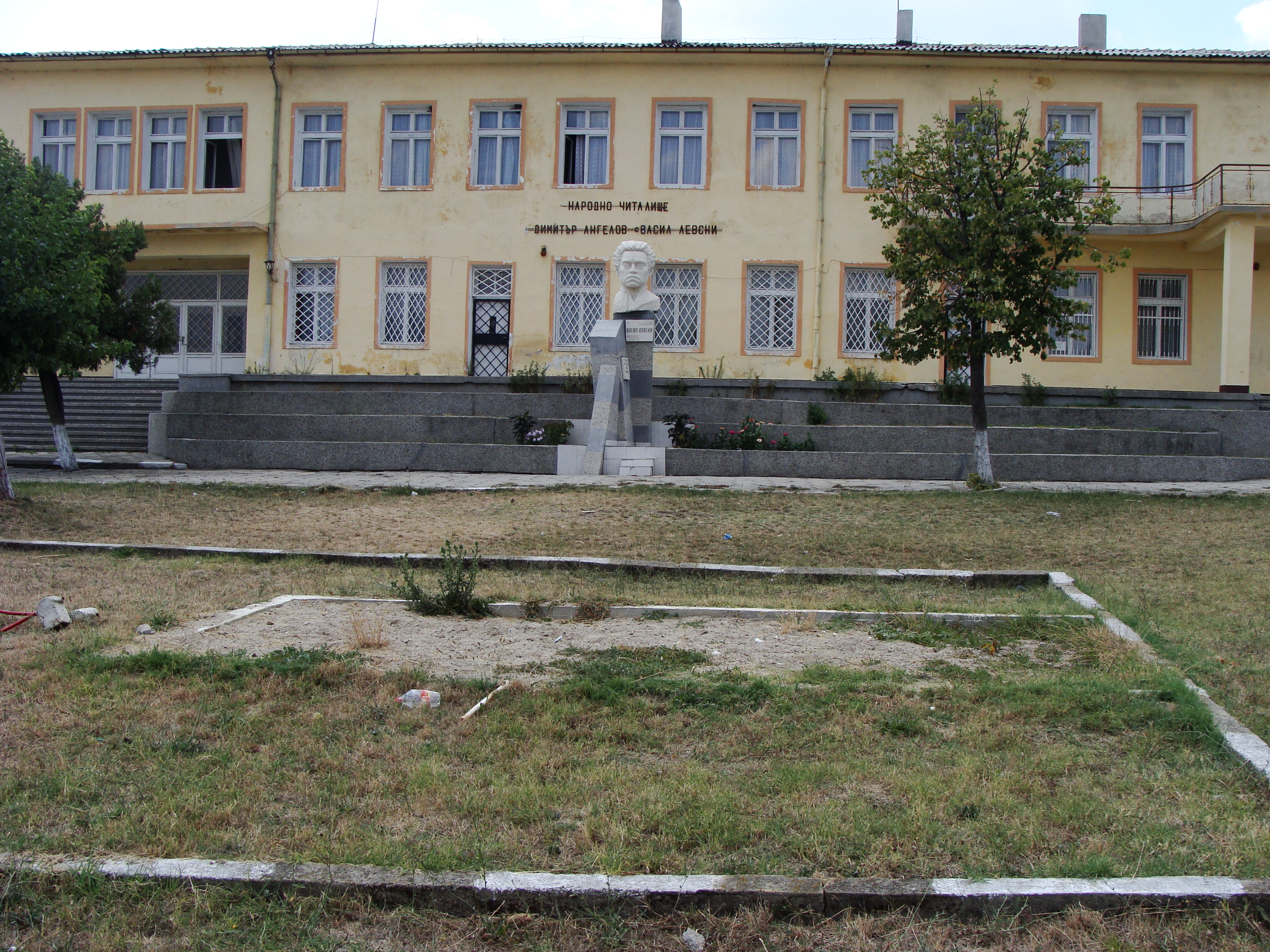 Площада в центъра на селото между читалището и кметството. В далечината се вижда паметника на Васил Левски